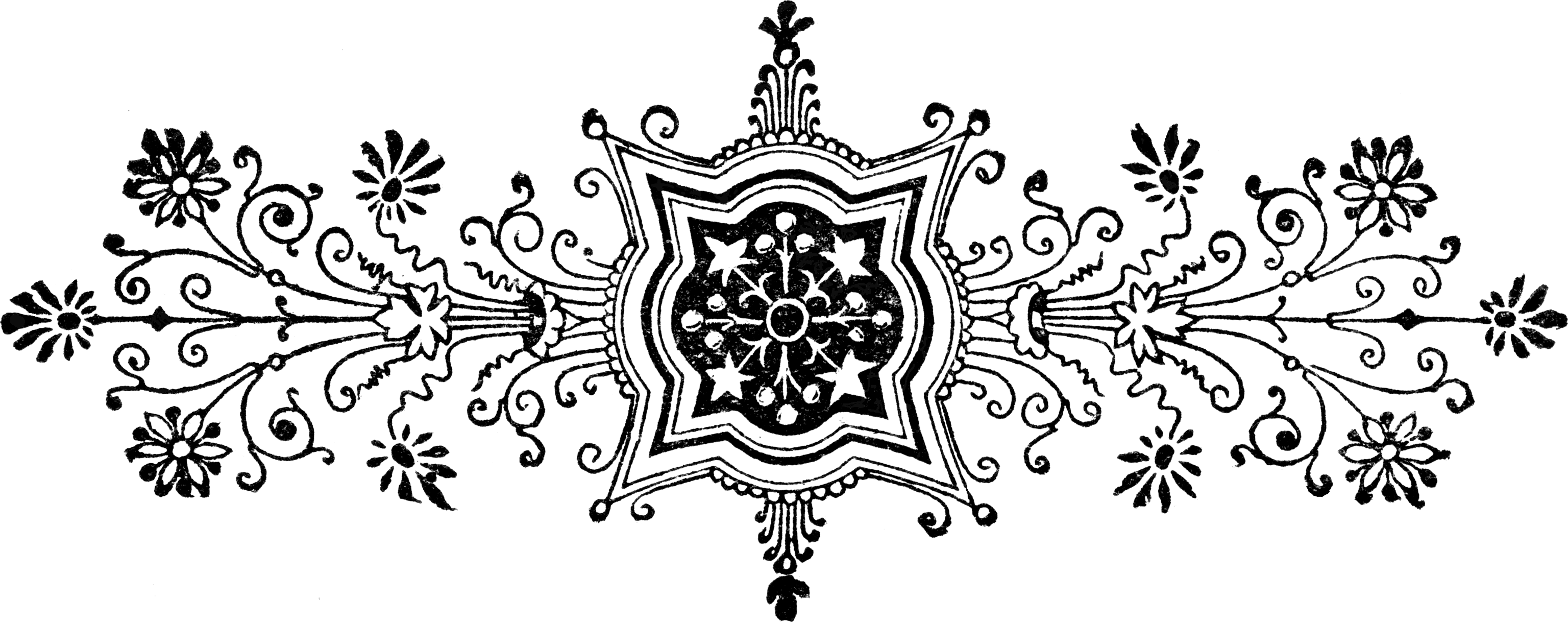 Vignette